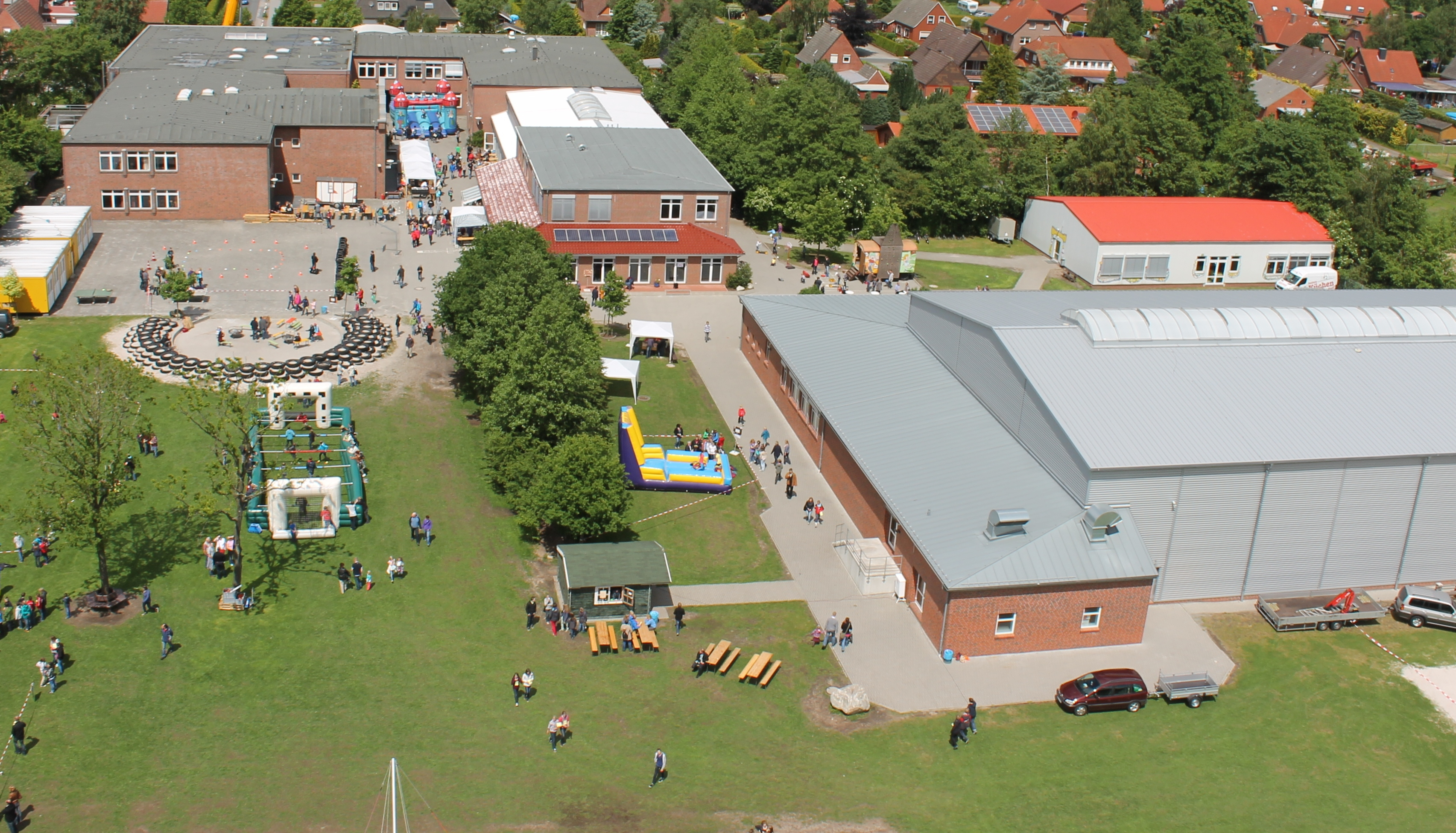 Freie Christliche Schule Ostfriesland, Schrägluftbild vom Hauptstandort von Süden her